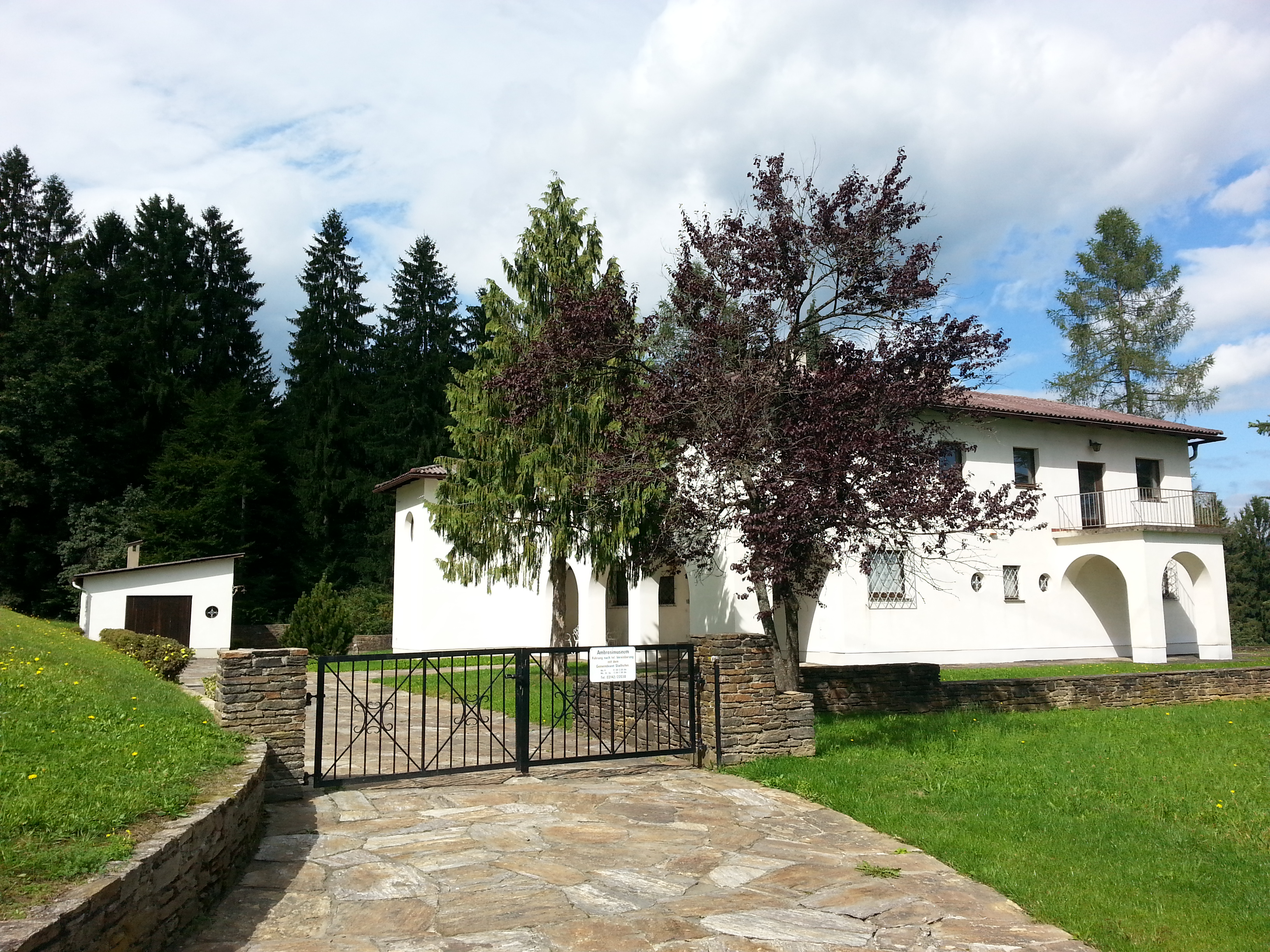 Gustinus Ambrosi-Museum, Stallhofen, Weststeiermark.